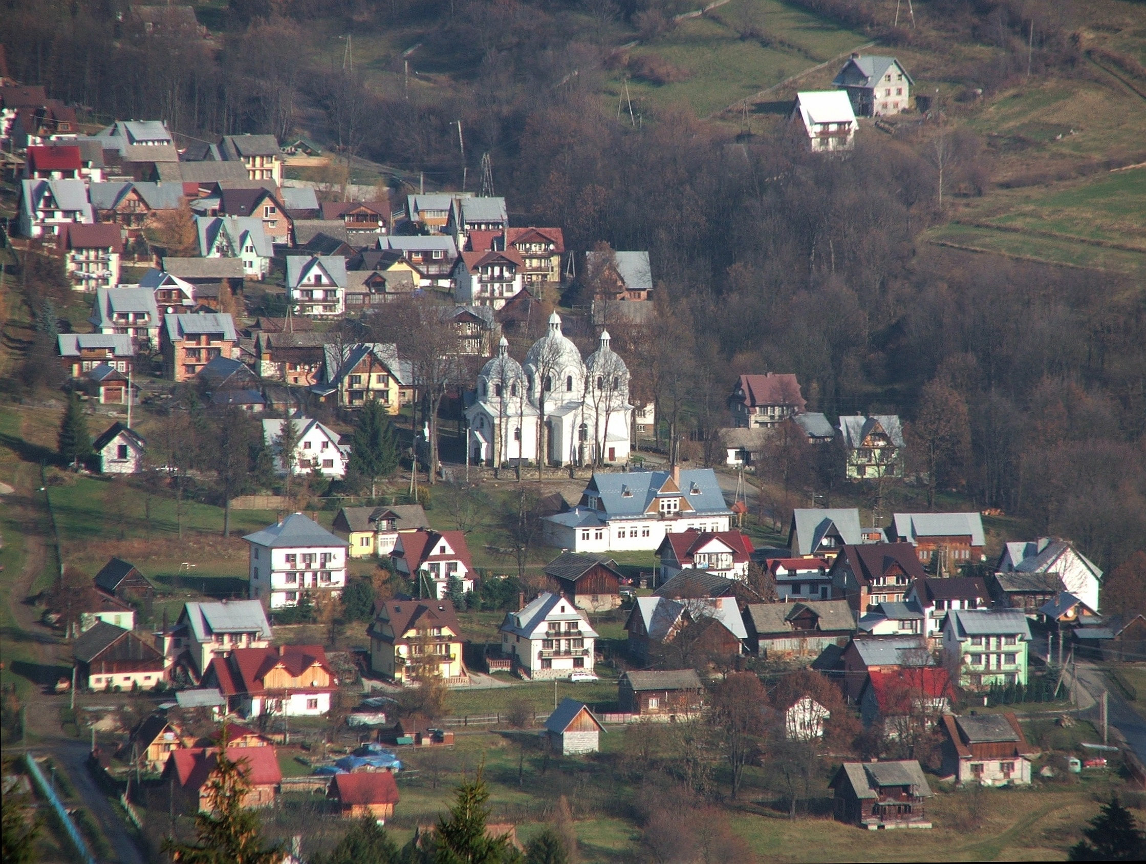 Szlachtowa. Widok z Pienin